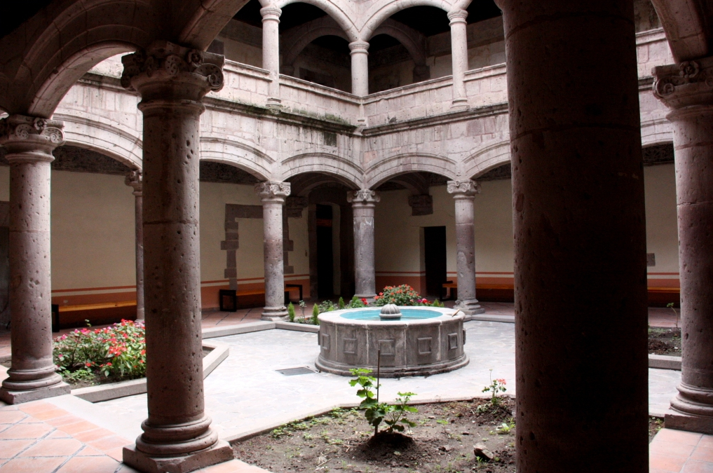 Igreja São Francisco de Assis, Tepeji del Rio, Estado de Hidalgo, México